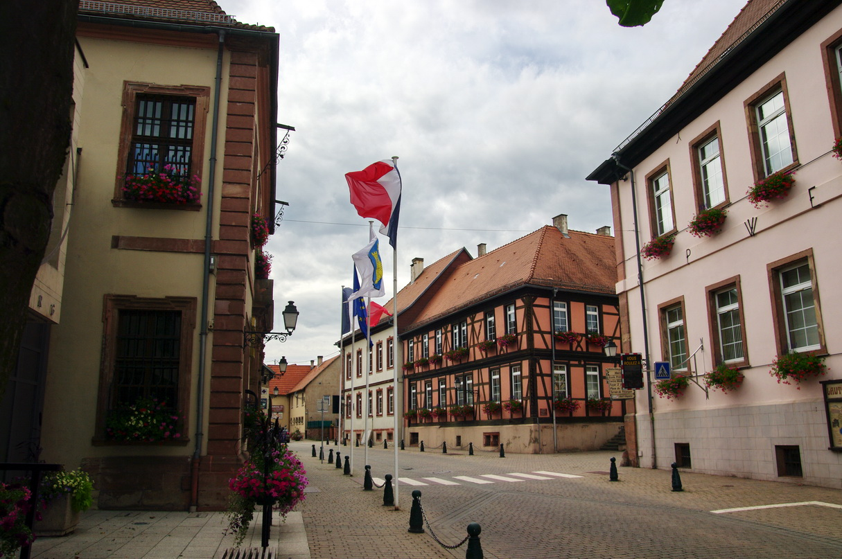 Hauptstraße in Lauterbourg